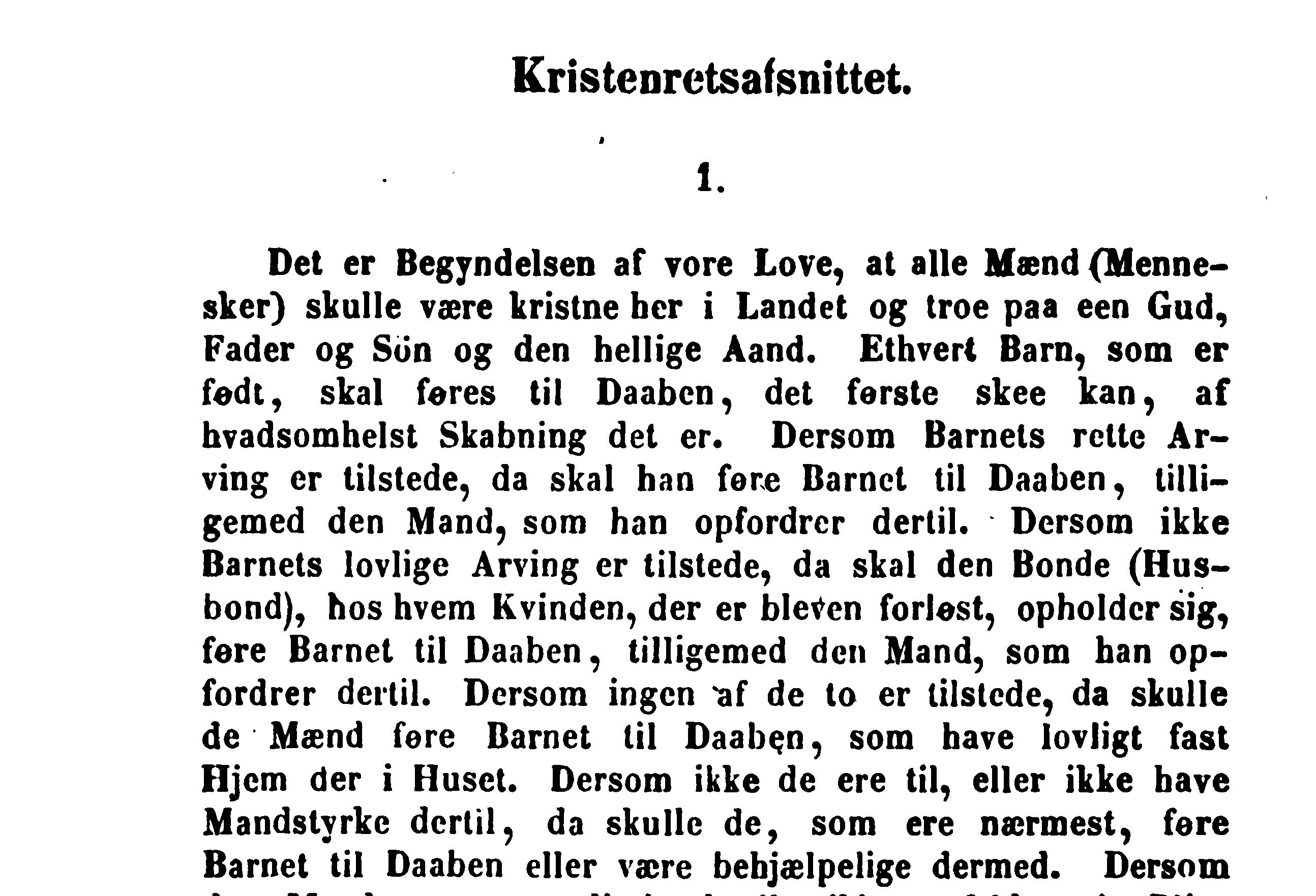 Facsimilie of introduction to Grágás